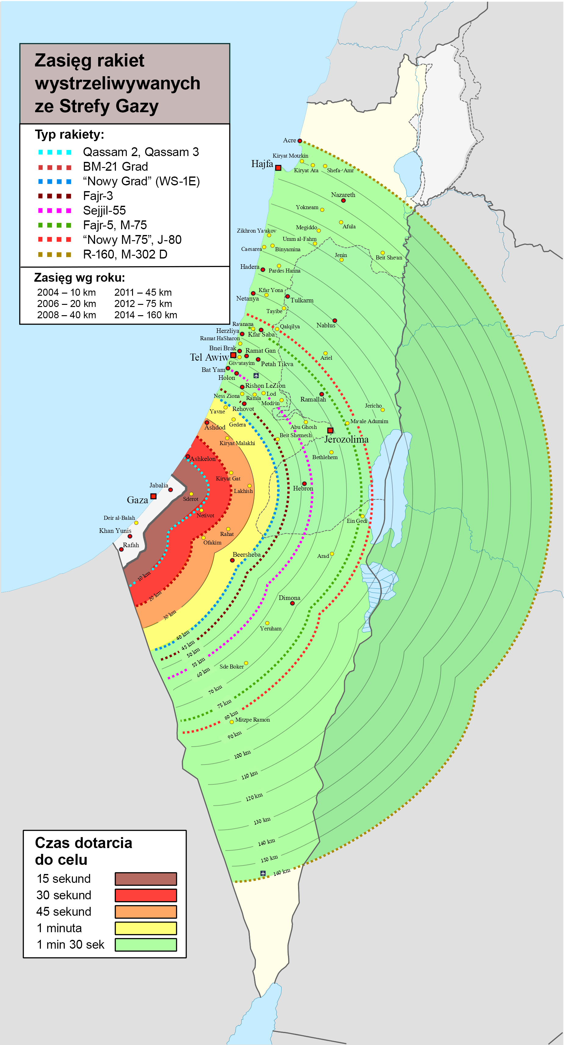 Mapa z legendą i zasięgiem rakiet wystrzeliwywanych z Gazy, z podziałem na lata